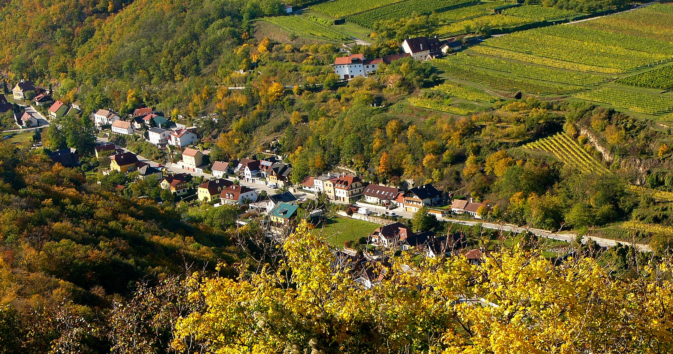 Steinaweg vom Benetiktinerstift Göttweig aus gesehen.